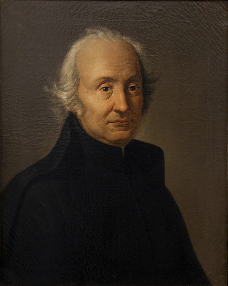 Ritratto dell'astronomo Giuseppe Piazzi